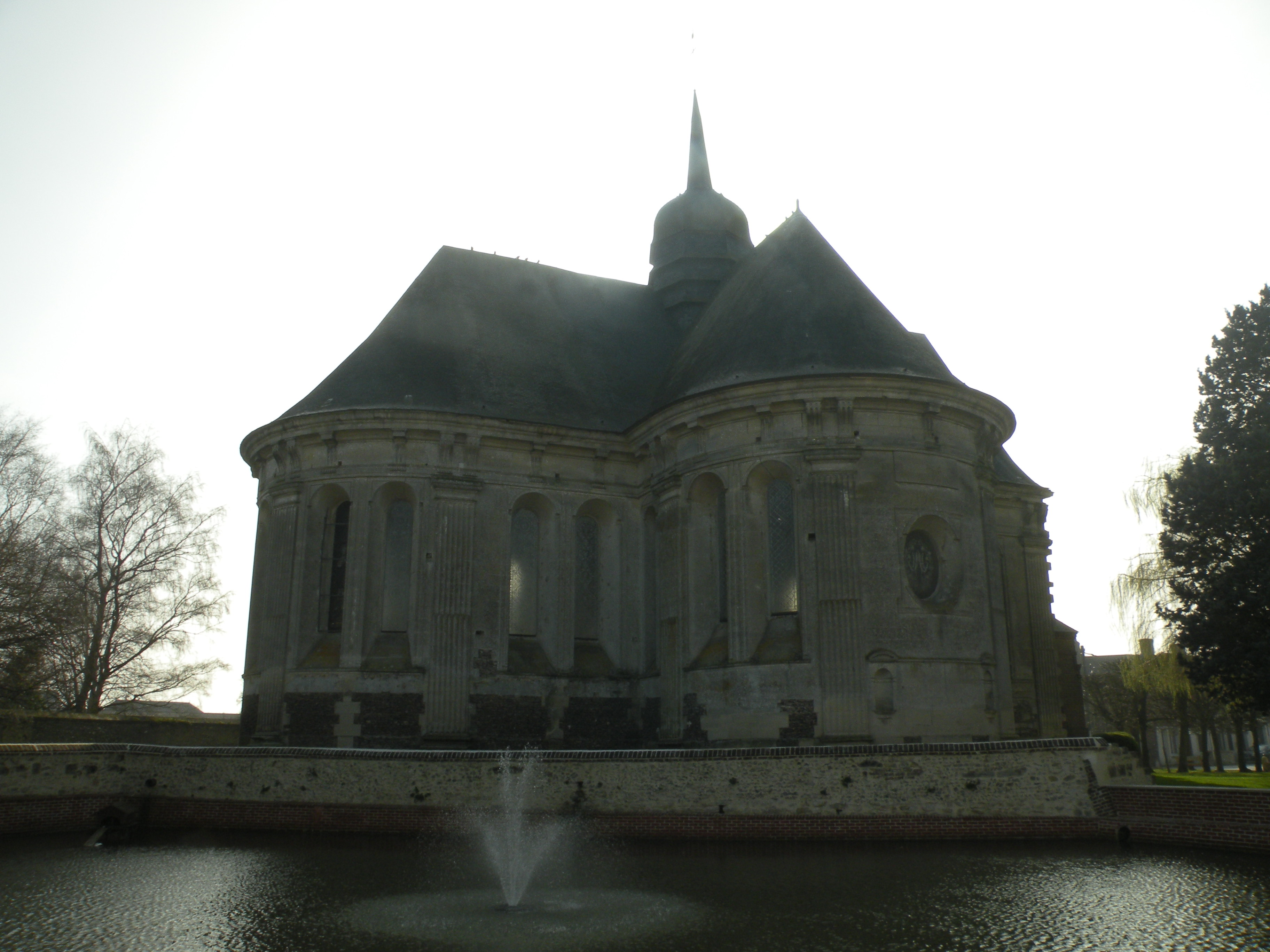 église Saint-Pierre et Saint-Paul de Jouy-sous-Thelle